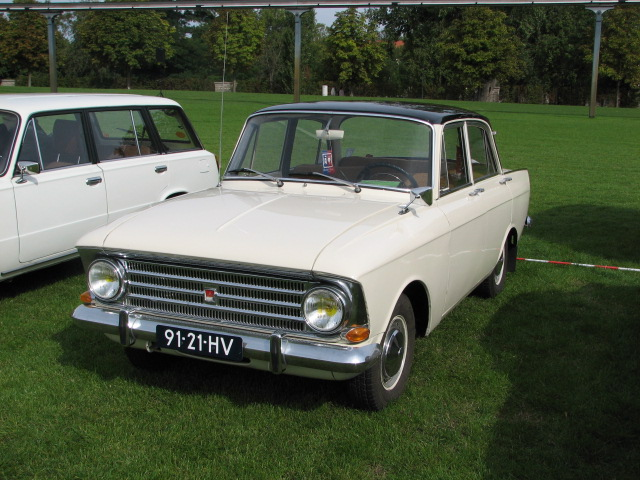 Scaldia 1400 (Moskvich 408) from "Russische Klassieker Club Nederland" at Ostmobil Meeting Magdeburg 2006